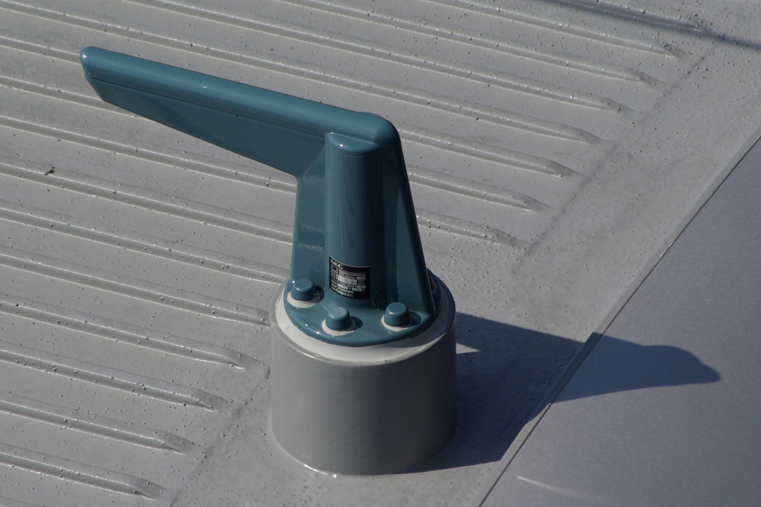 東急5000系電車 (2代) クハ5113の空間波無線(SR)アンテナ